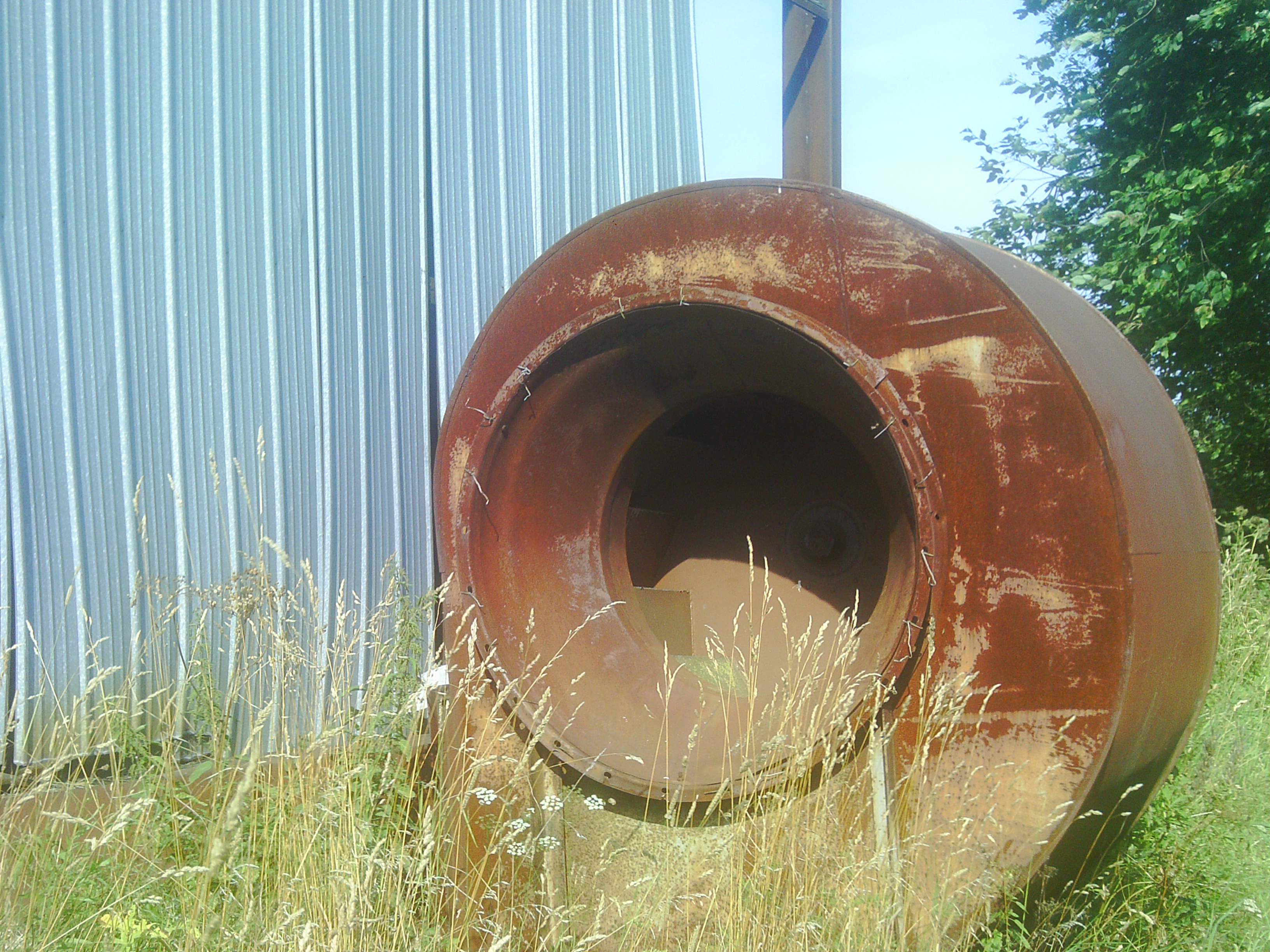 Центробежный вентилятор